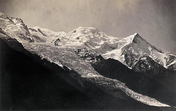 "5. Mont Blanc vu de Chamonix", 1859-1860 Album Haute-Savoie. Le mont Blanc et ses glaciers. Souvenir du voyage de LL. MM. l'empereur et l'impératrice, par MM. Bisson frères photographes de Sa Majesté l'empereur.